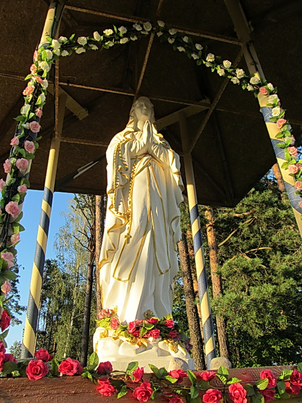 Вайнюны. Каплічка